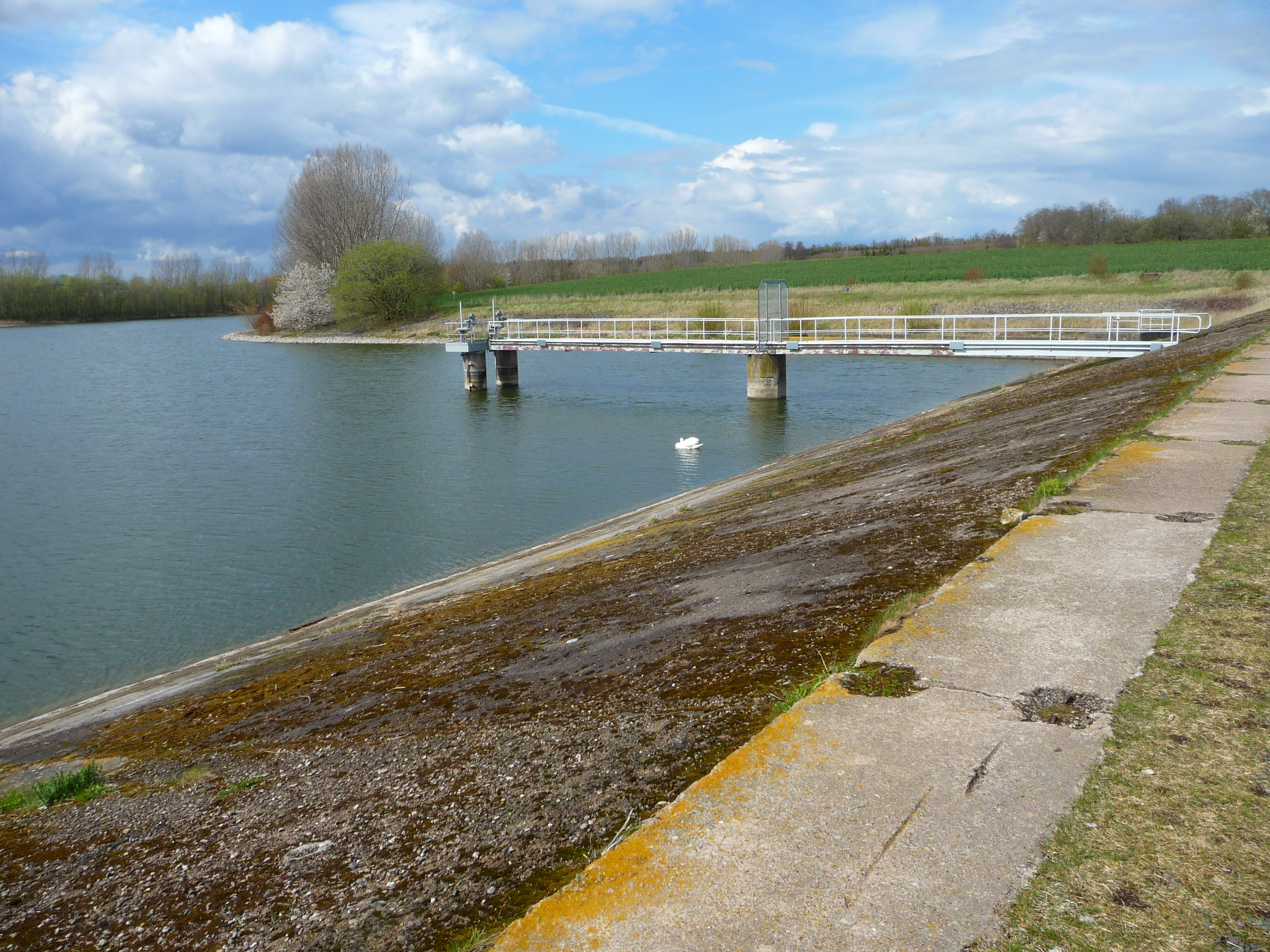 Dieses Bild zeigt die Talsperre Birkungen im Eichsfeld und einen Teil des Wanderweges rund um den Stausee.